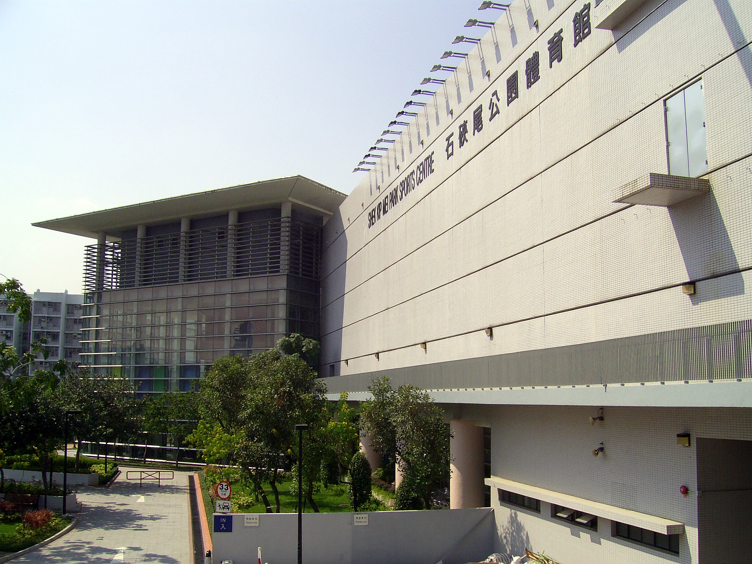 中文（香港）: 石硤尾公園體育館